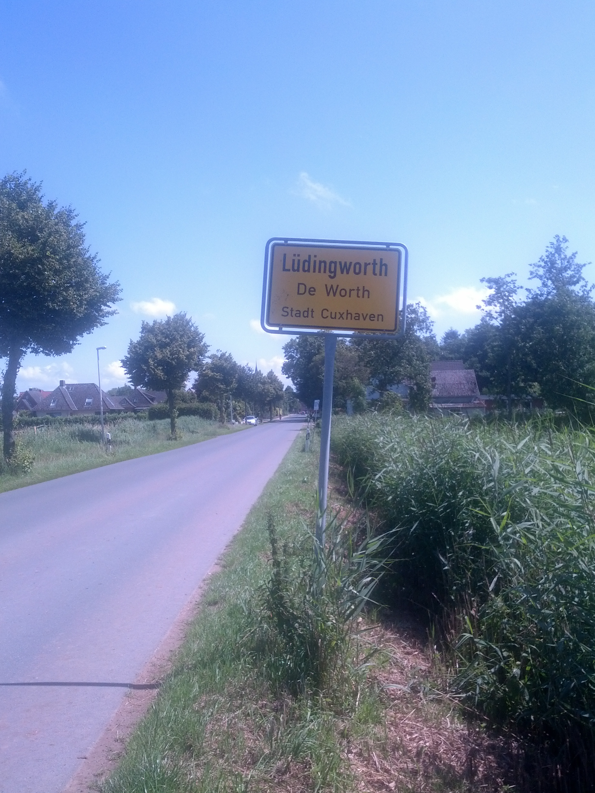 Oortsschild von de Worth, Landkreis Cuxhoben, mit den Naam op Hoochdüütsch un op Plattdüütsch